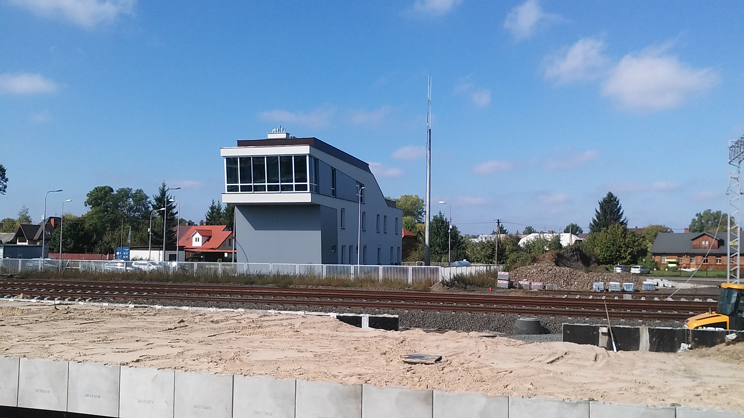 stacja kolejowa Małkinia - LCS (lokalne centrum sterowania)